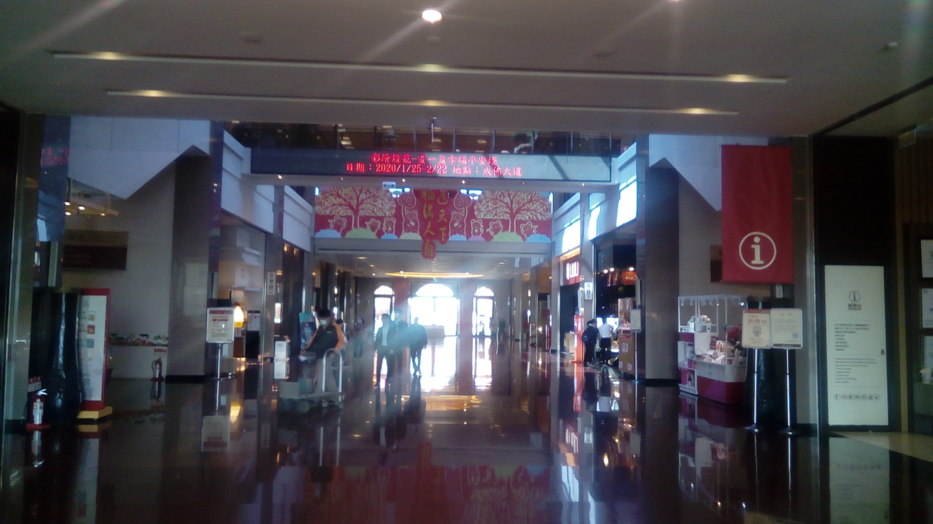 主殿大廳